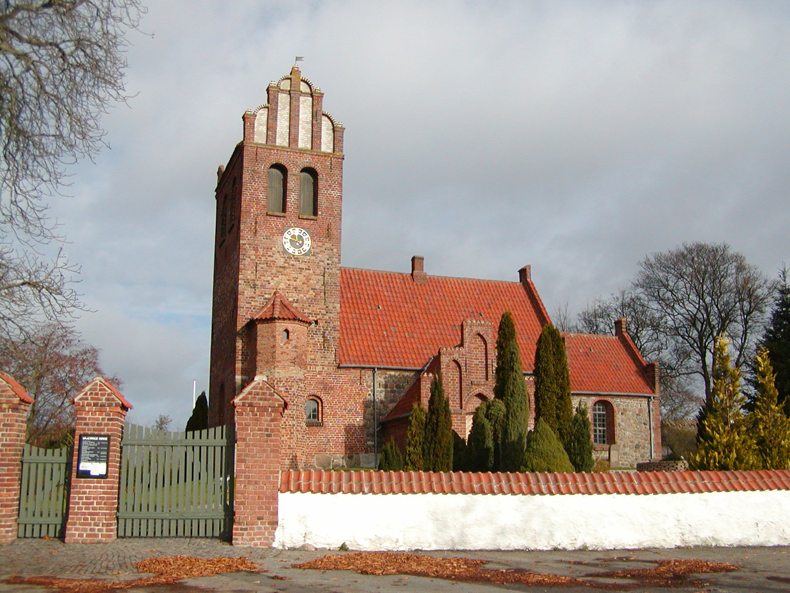 Skævinge Kirke